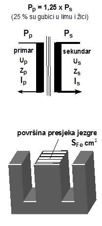 parametri za proračun transformatora